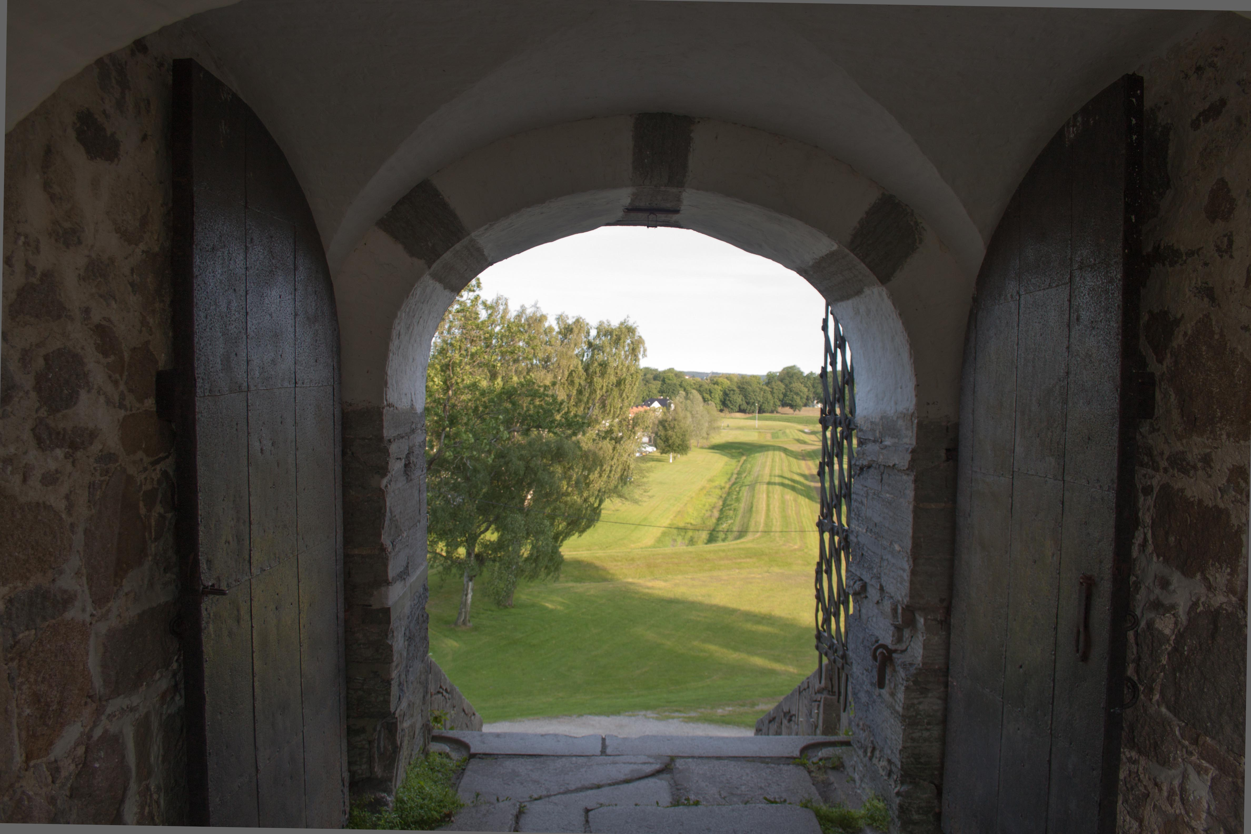 Kongsten Fort